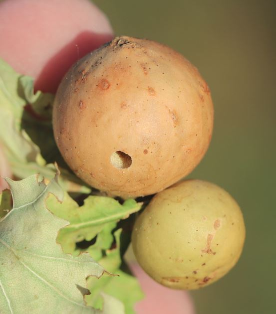 Galläpfel der Gallwespe Andricus kollari